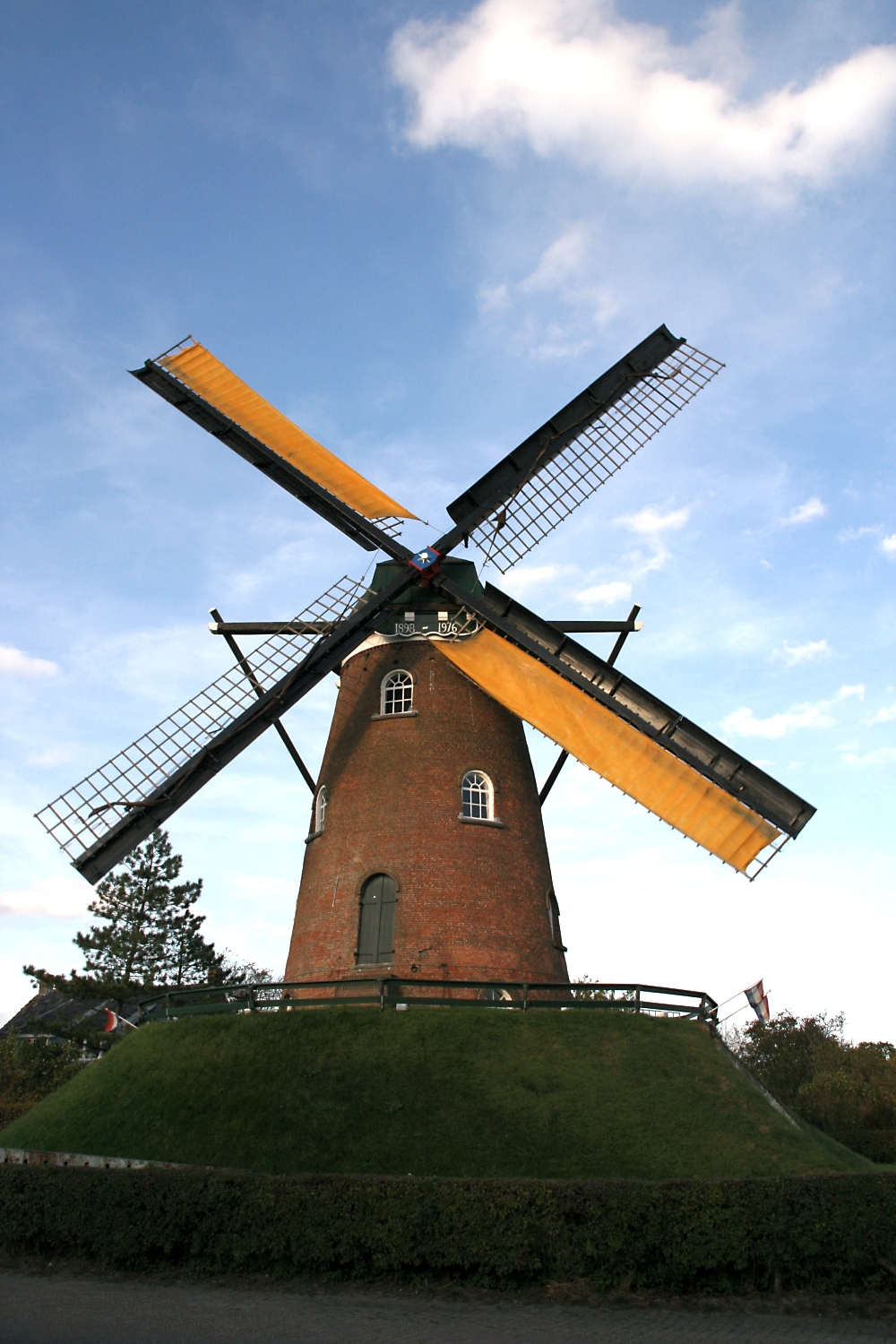 Cadzand: molen Nooit Gedacht met 2 zeilen